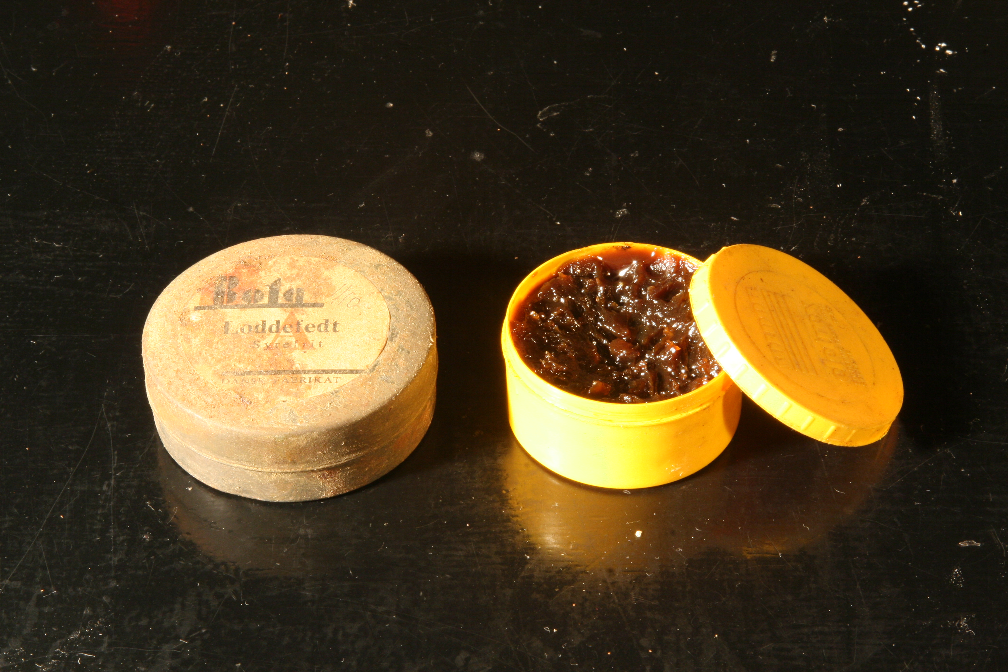 To dåser med loddefedt